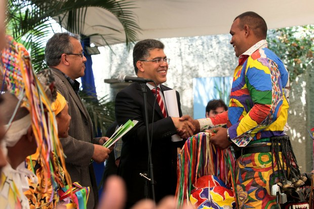 La Cancillería entrega Certificado de UNESCO como Patrimonio Cultural e Inmaterial de la Humanidad